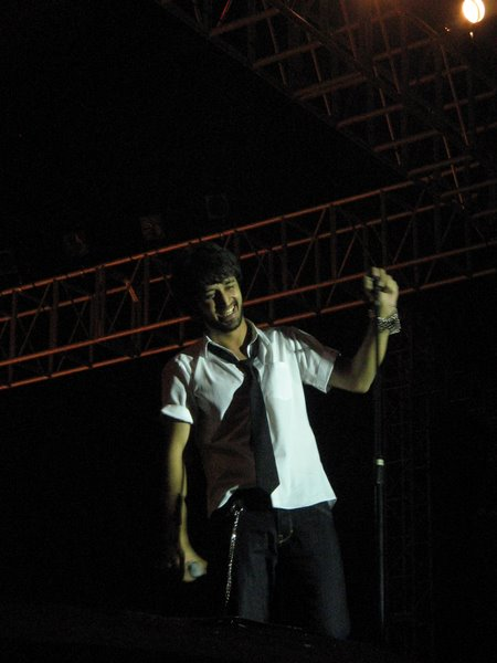 Atif Aslam at Antaragni, IITK